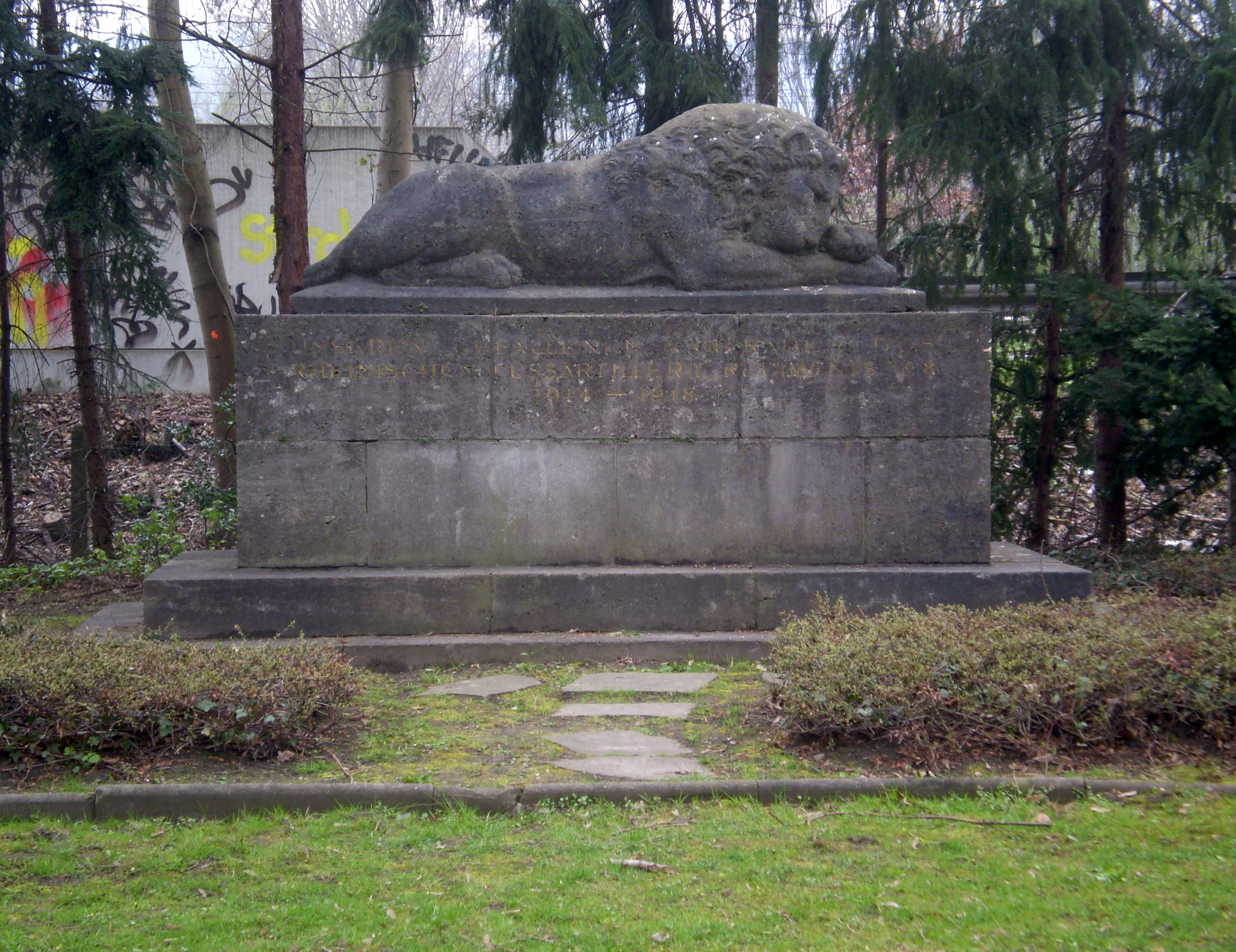 Kriegerdenkmal (Löwendenkmal; aufgestellt 1927) an der Bundesstraße 42, Girardetallee, Bad Honnef This is a photograph of an architectural monument. 263